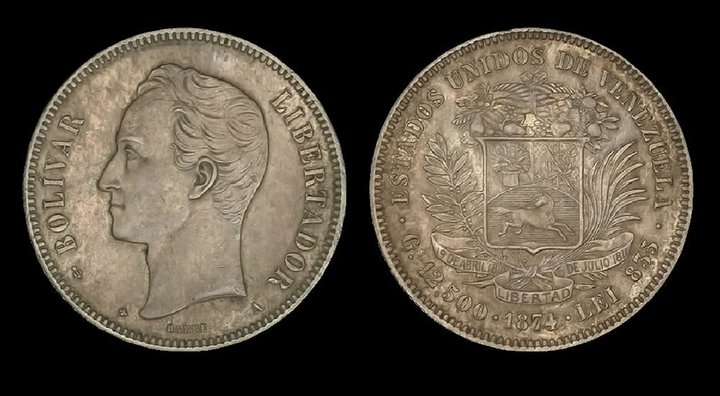 50 Centavos de Venezolano 1874